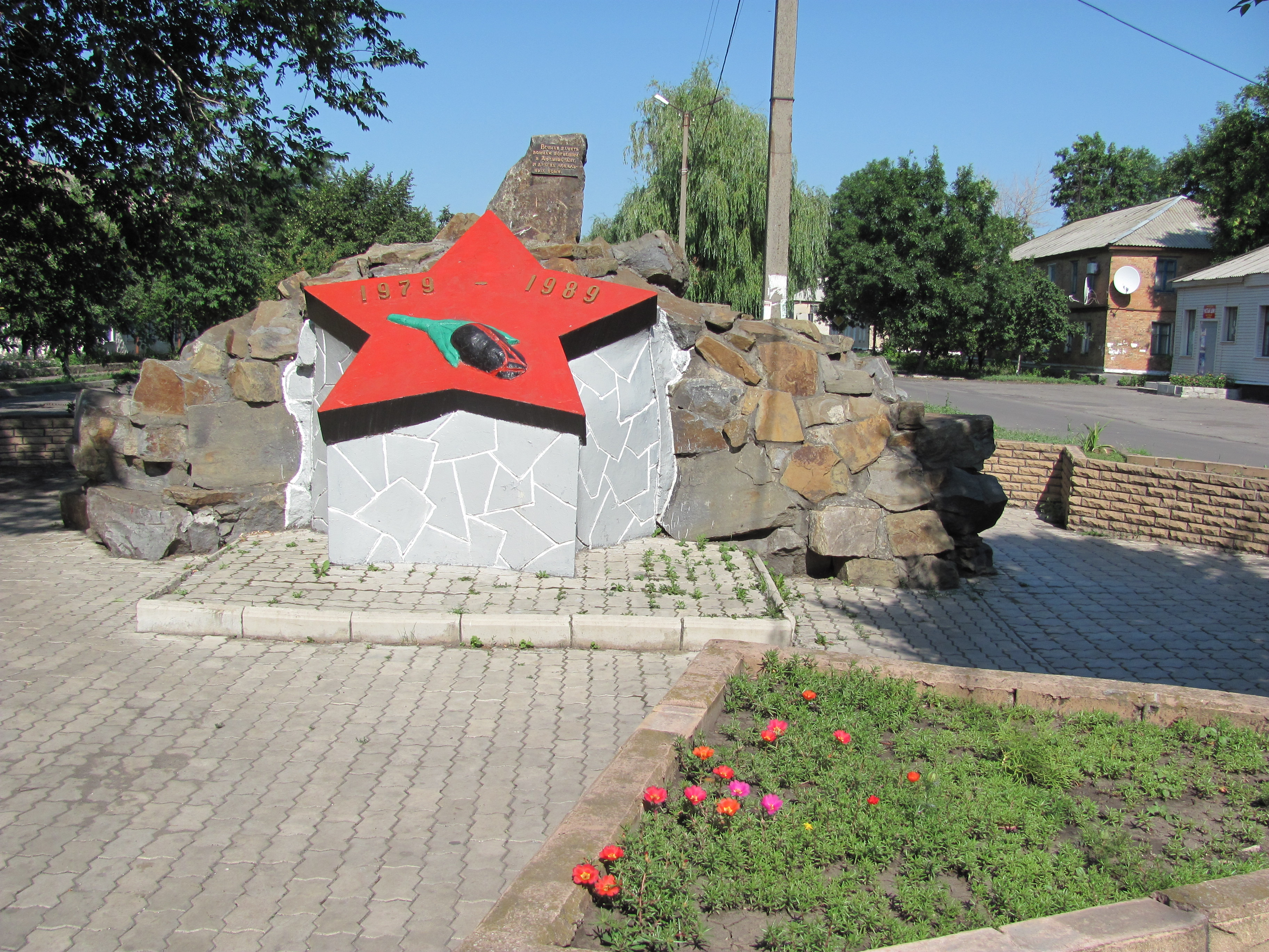 Червонопартизанск